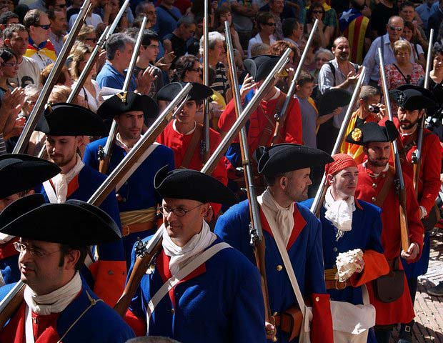 Associació Cultural Miquelets del Regne de València i Associació Cultural Miquelets de Catalunya. Recreació història de l'Exèrcit de Catalunya 1713-1714 durant la Diada de l'Onze de Setembre.